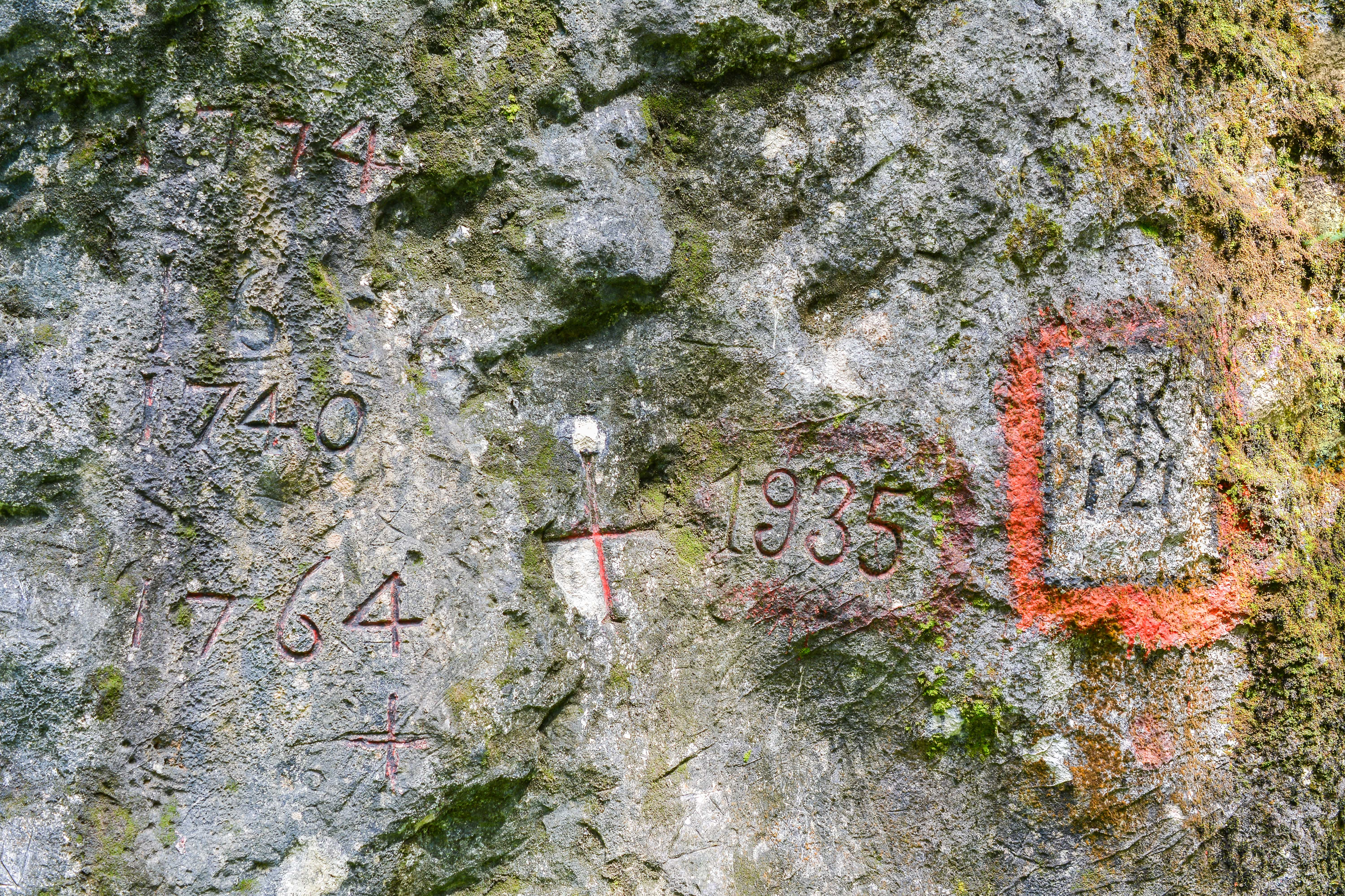 Der Bildfelsen VII (Nummerierung gemäß Burgstaller/Kiesenhofer/Freh/Lauth, 1961), der Markierungsfelsen, befindet sich ungefähr in der Mitte der Fundstelle. Der Felsen markiert die Grenze zwischen den ehemals dem Stift Spital am Pyhrn und den privaten Eigentümern gehörenden Liegenschaften. Die Jahreszahlen beziehen sich auf den Zeitpunkt diverser Grenzbegehungen.